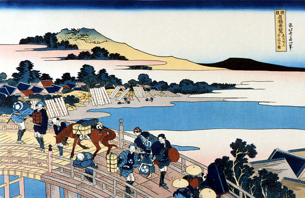 ゑちぜんふくゐの橋(えちぜんふくいのはし)